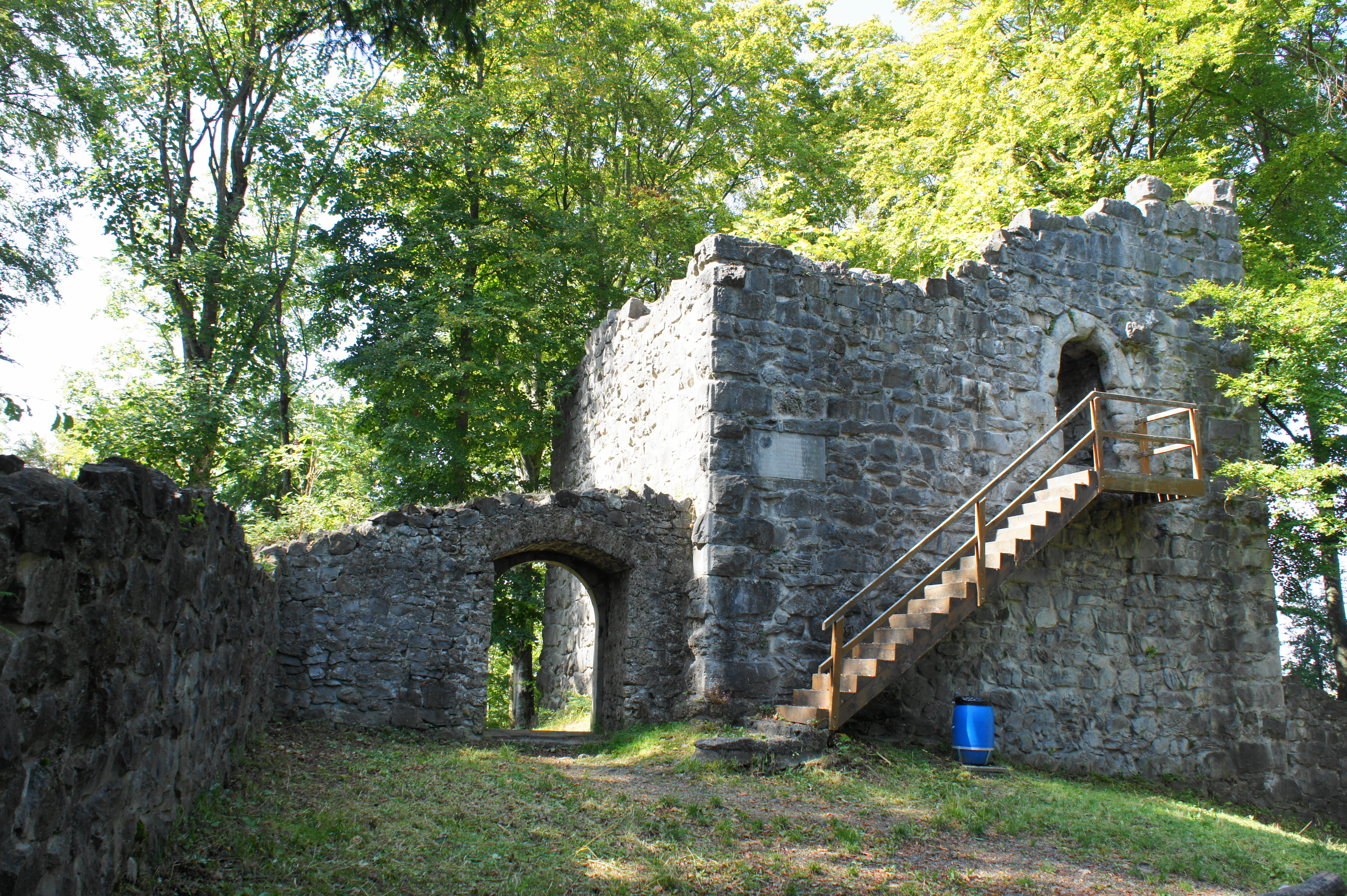 Innenhof der Ruine Ramsenburg, Blick Richtung Eingang (links) und hölzerner Treppe, die zum mit einem Gitter verschlossenen Eingang der Turm-Ruine (rechts) führt, in der Bildmitte eine steinerne Inschrift-Tafel in der Turm-Mauer